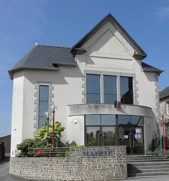 Mairie de Saint-Sauveur-des-Landes (35).